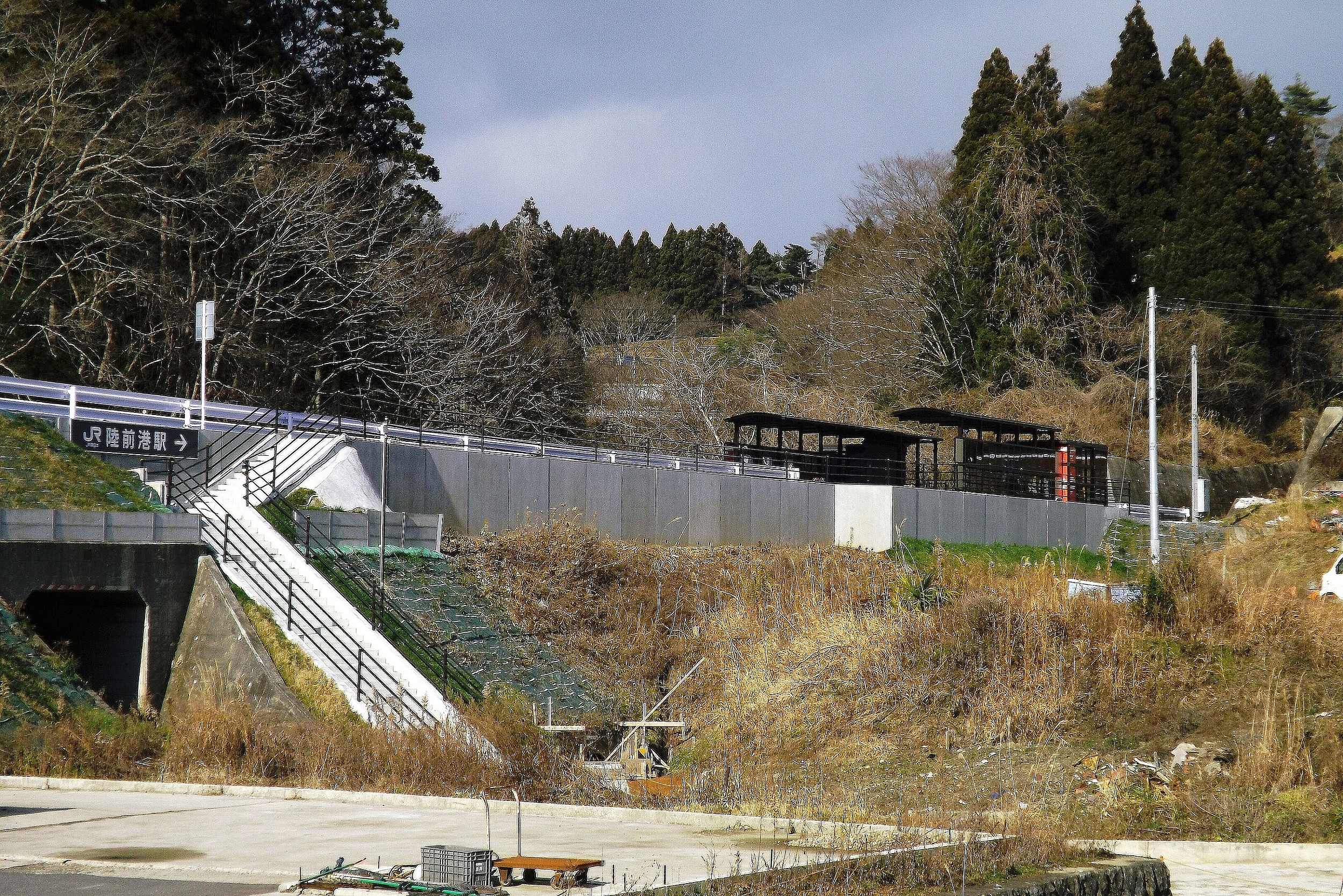 駅全景。(2013-12-24)